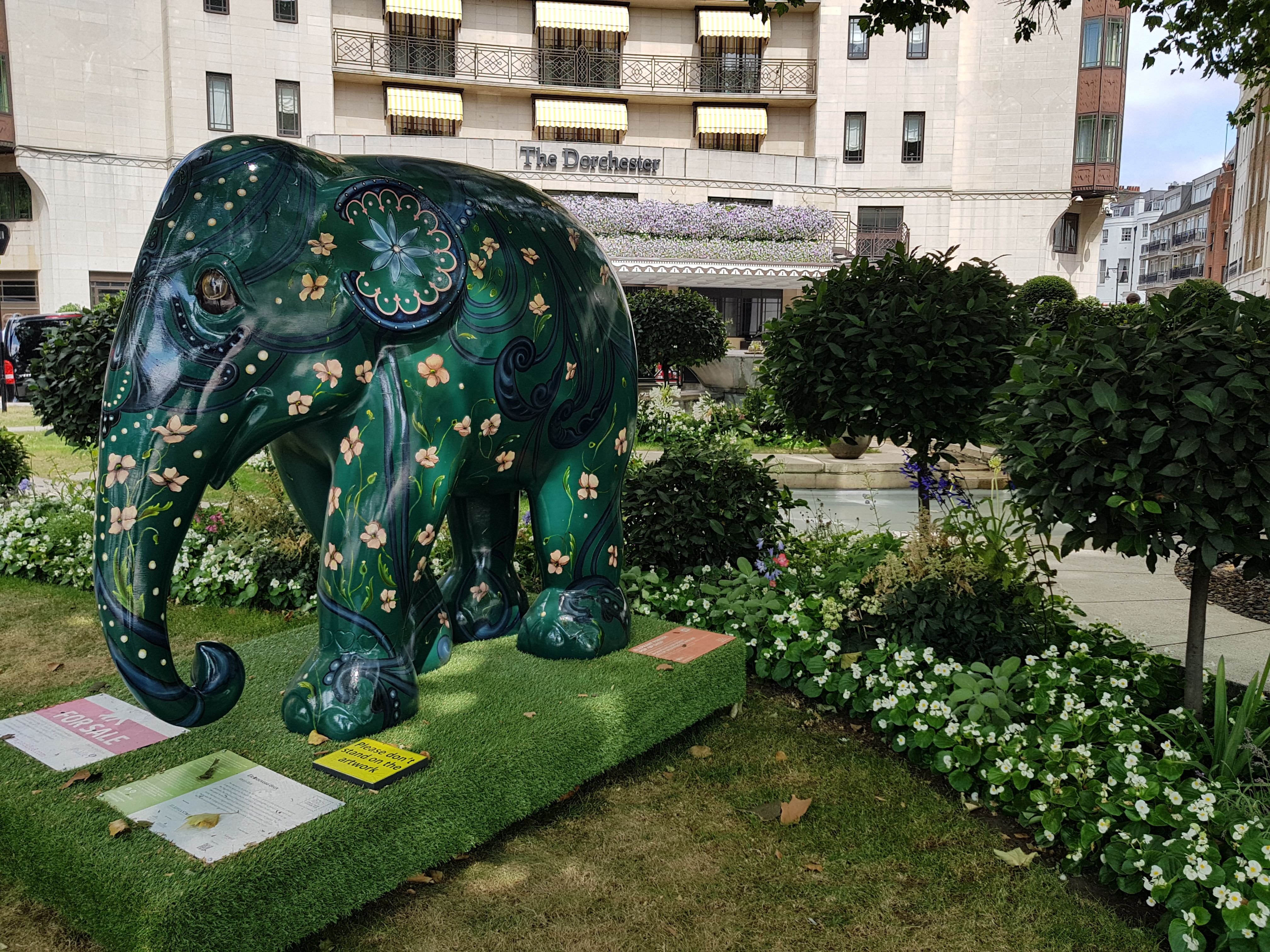 Hôtel Dorchester, Londres.